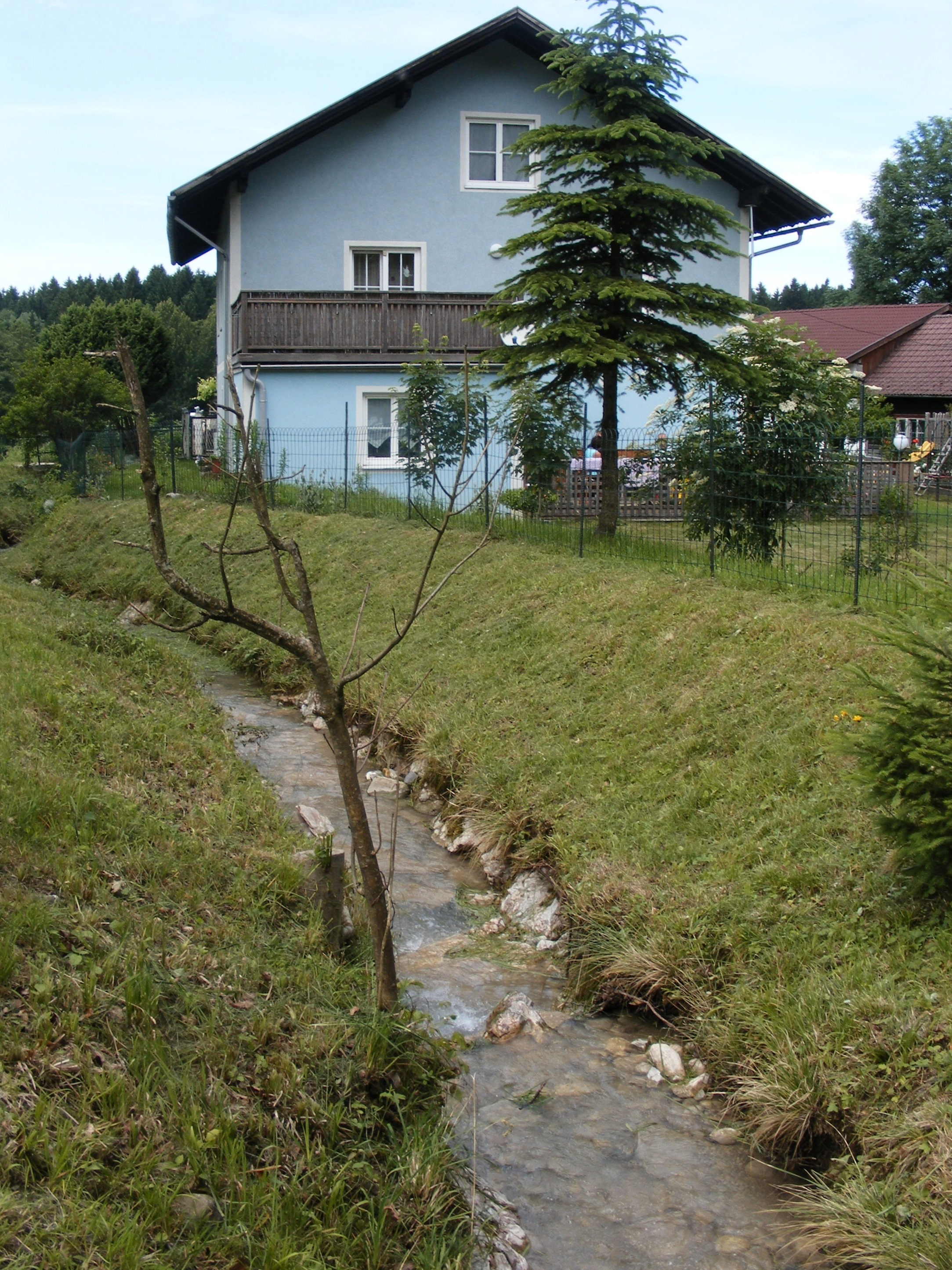 Der Kroisbach im Unterlauf bei Pointlau, Gemeinde Nußdorf am Haunsberg, Land Salzburg